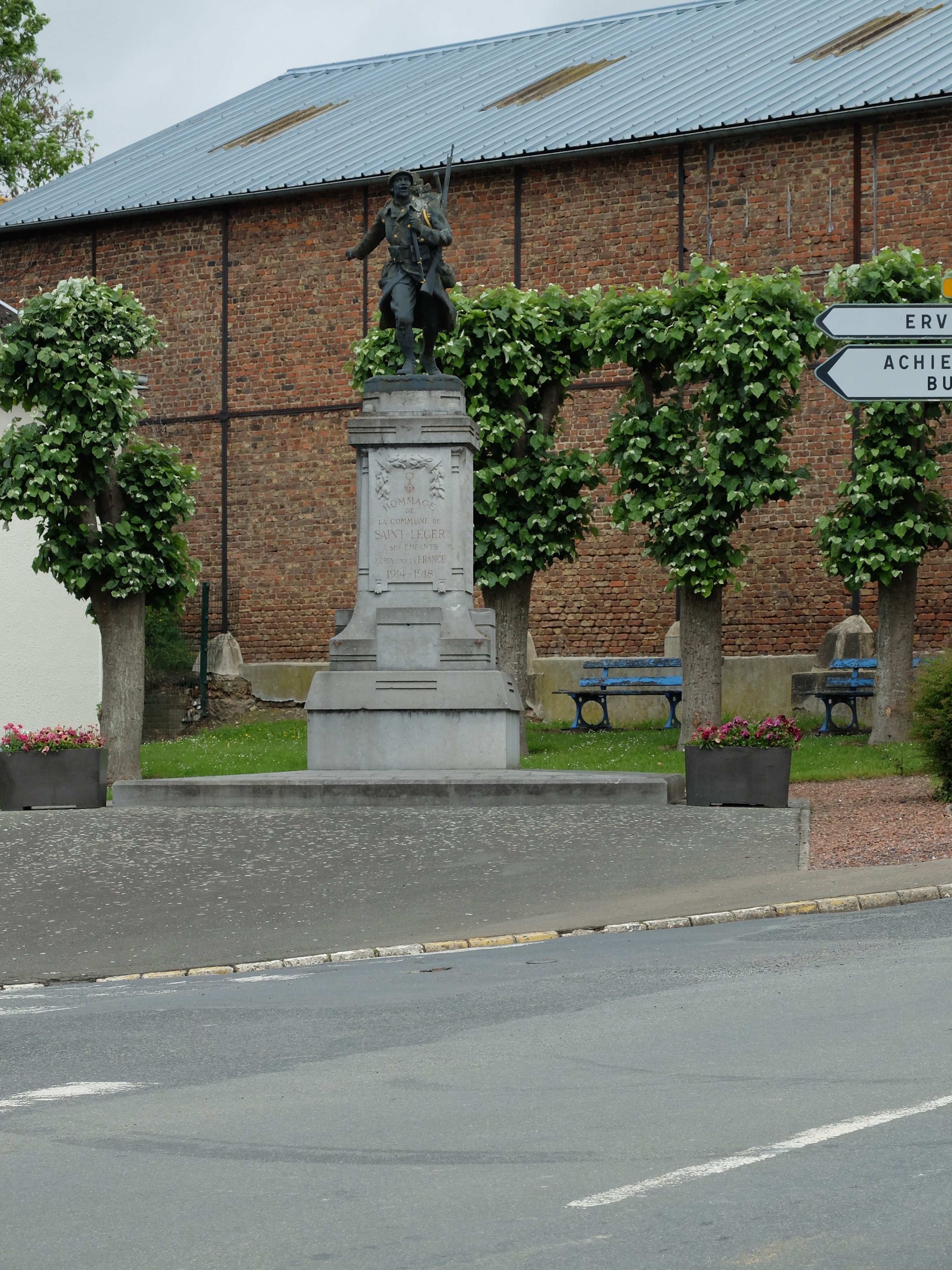 Vue du monument aux morts de Saint-Léger (Pas-de-Calais).